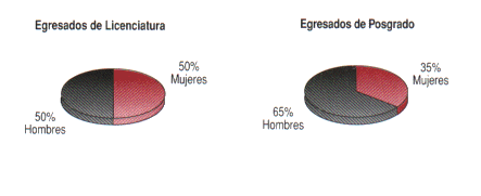 Egresados de la Universidad Autonoma de Guerrero en Licenciatura y Posgrado por sexo.